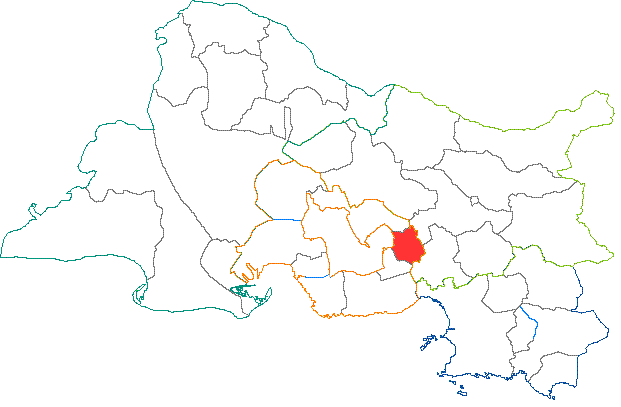 Situation du canton dans le département des Bouches-du-Rhône (France)